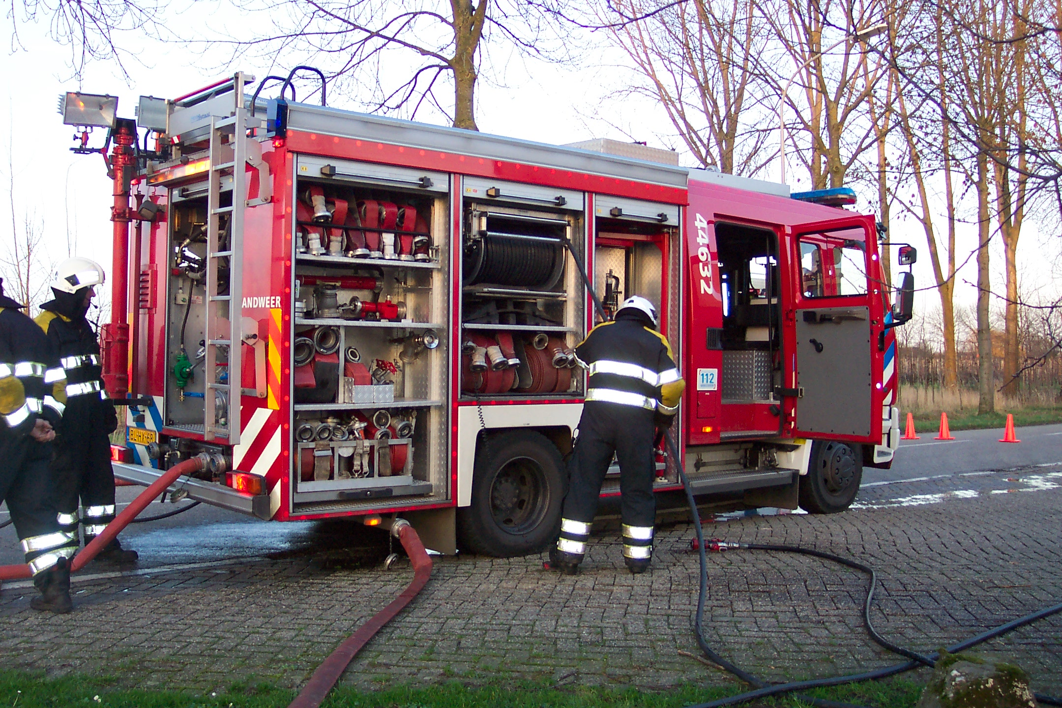 Tankautospuit (pumper/fire engine)